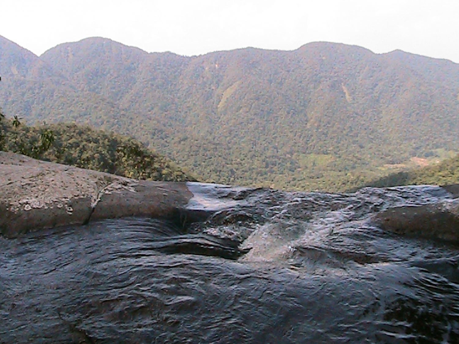 INICIO